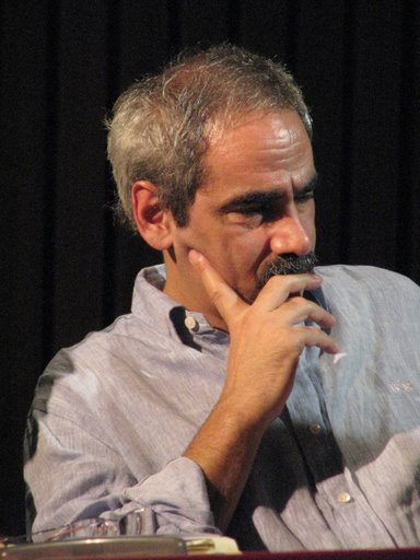 Presentación de Alejandra Pizarnik, maestra de psicoanálisis (2010)